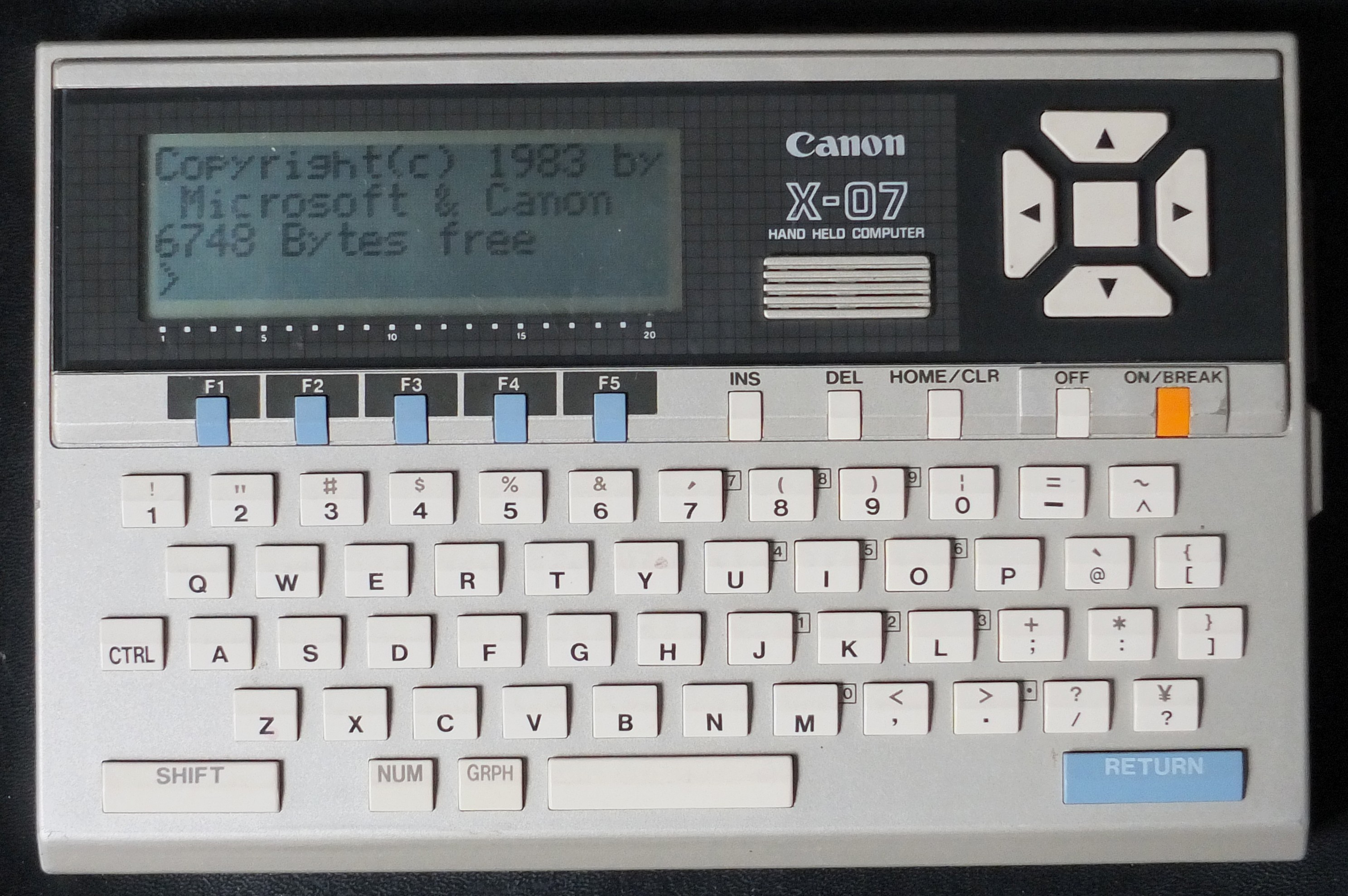 Mini-ordinateur personnel Canon X-07 (1983) - 20 x 13 x 3 cm